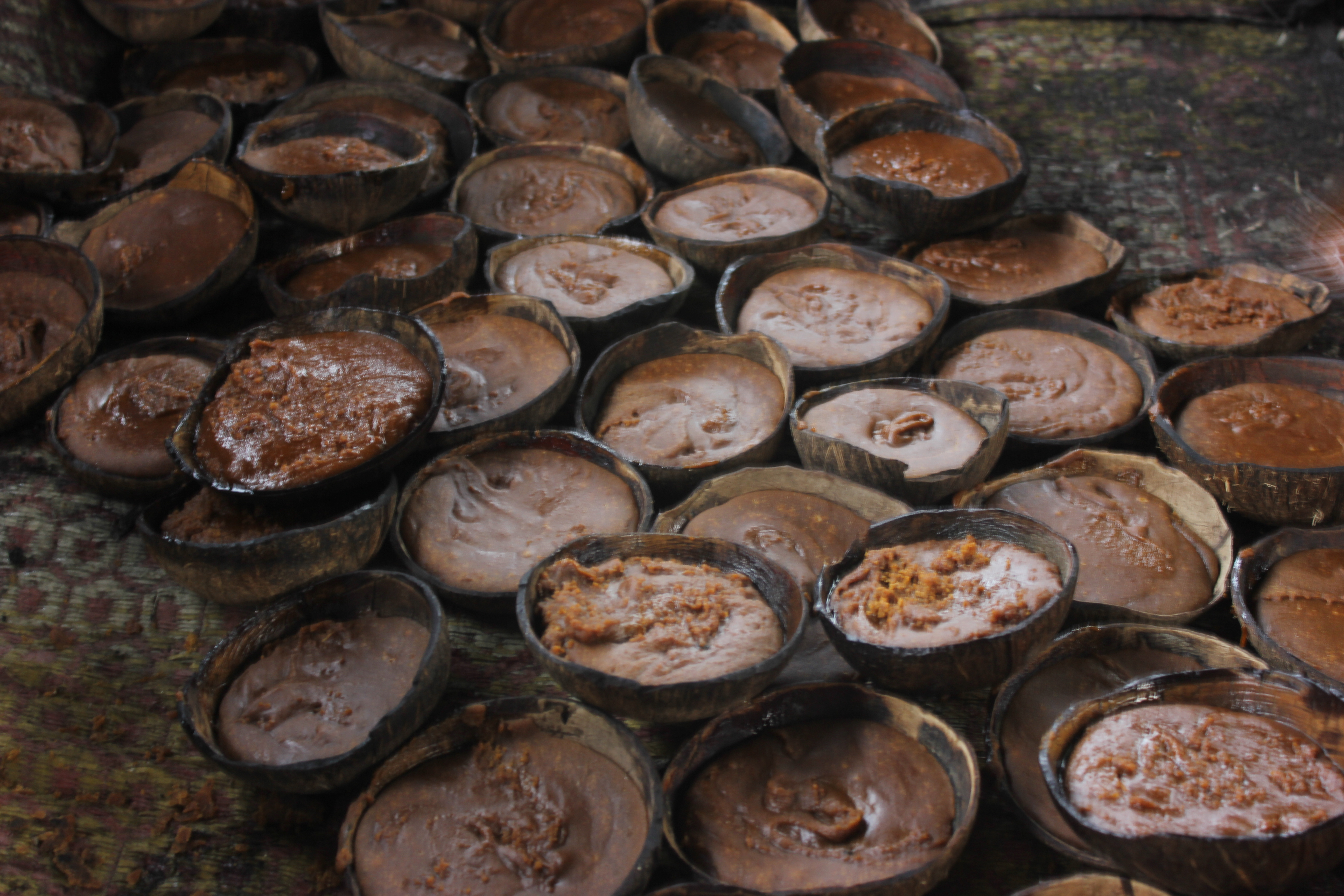 Gulo Saka merupakan sebutan untuk gula merah tebu bagi masyarakat lokal Minangkabau, Foto ini adalah gulo saka di Nagari Talang Babungo, Kabupaten Solok